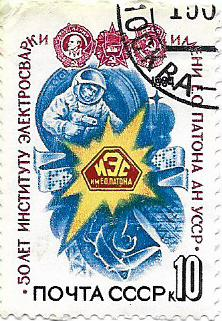 Почтовая марка «50 лет Институту электросварки имени Е. О. Патона АН УССР»